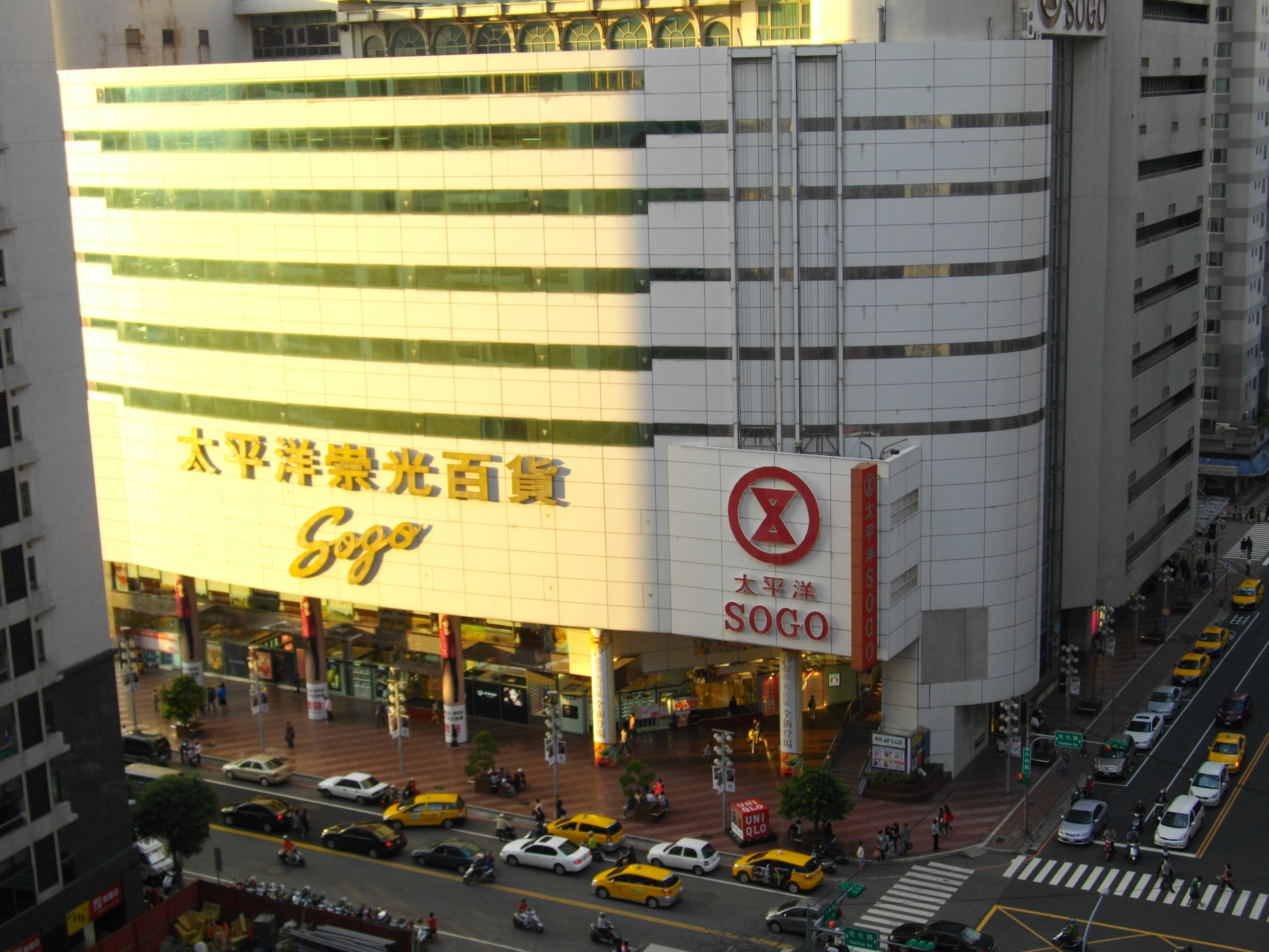 太平洋崇光百貨中壢店，位於桃園縣中壢市元化路357號。